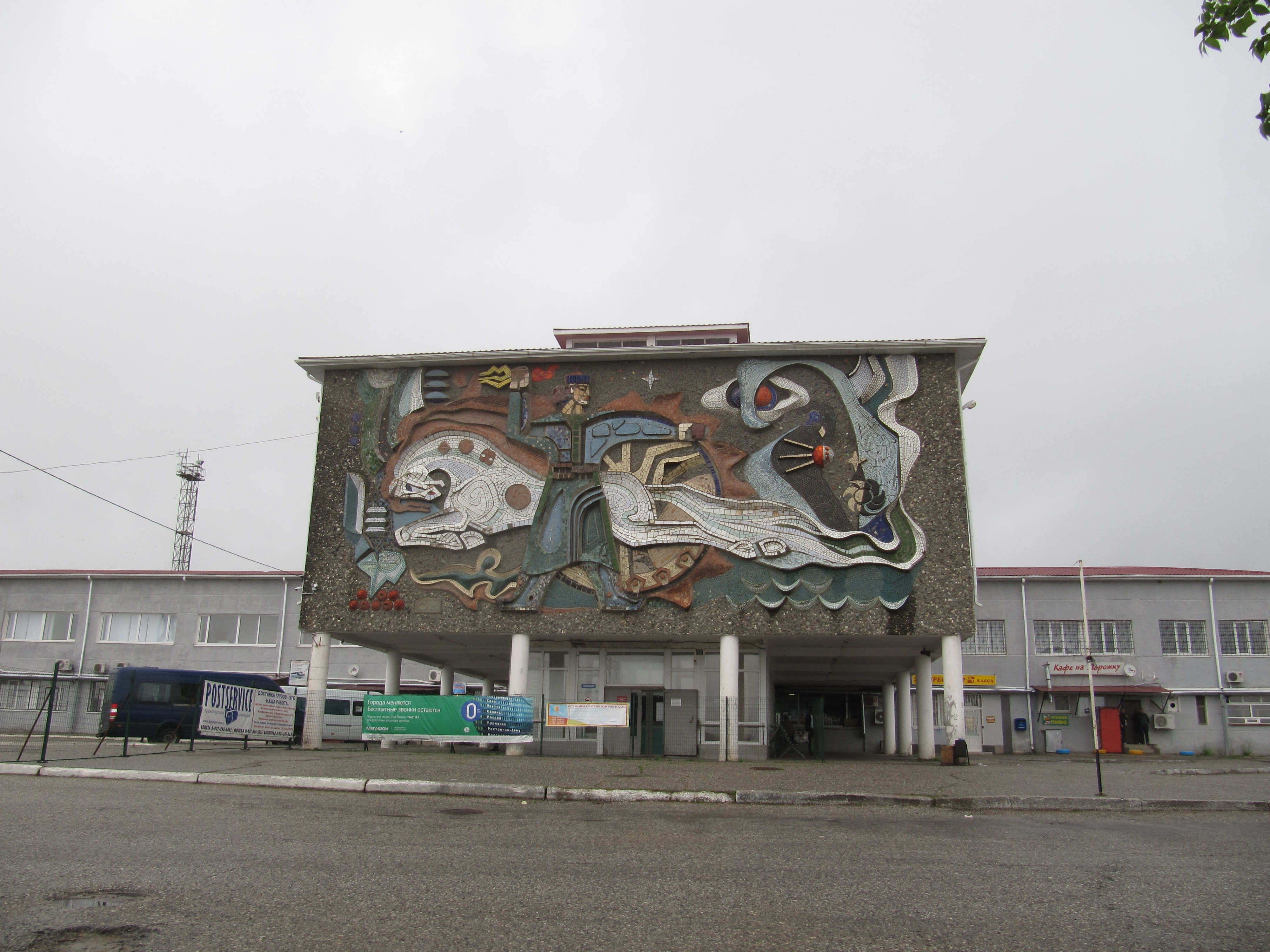 Элистинский вокзал